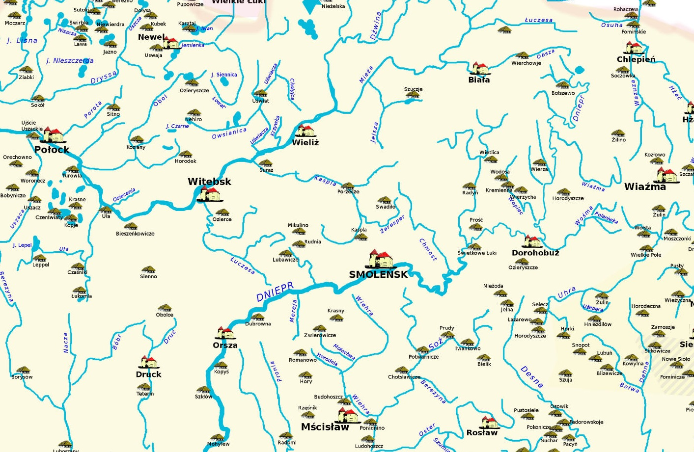 Brama Smoleńska w XV wieku